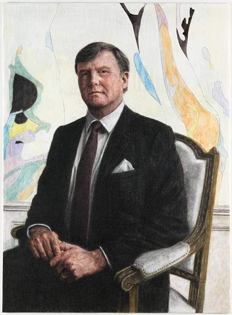 In april 2013 maakte Koos Breukel staatsiefoto's van Koning Willem-Alexander. In september van dat jaar gaven het ministerie van OCW en de Rijksvoorlichtingsdienst aan het Mondriaan Fonds de opdracht om de totstandkoming van drie staatsieportretten te begeleiden. Na een uitgebreide voorselectie werden in januari 2014 drie kunstenaars geselecteerd die een staatsieportret van de Koning mochten maken: Iris van Dongen, Rineke Dijkstra en Femmy Otten. Minister Bussemaker van OCW presenteerde de kunstwerken op 24 april 2014 in Paleis Het Loo.